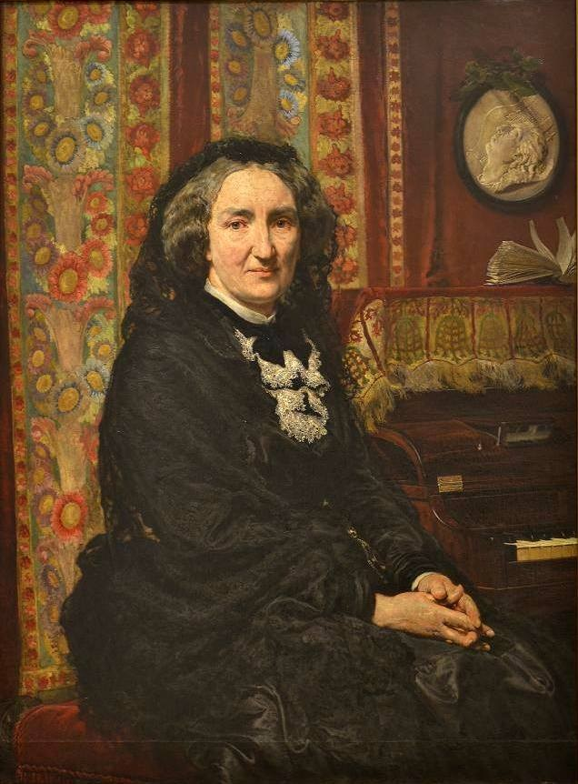 Portret Marceliny Czartoryskiej z Radziwiłów